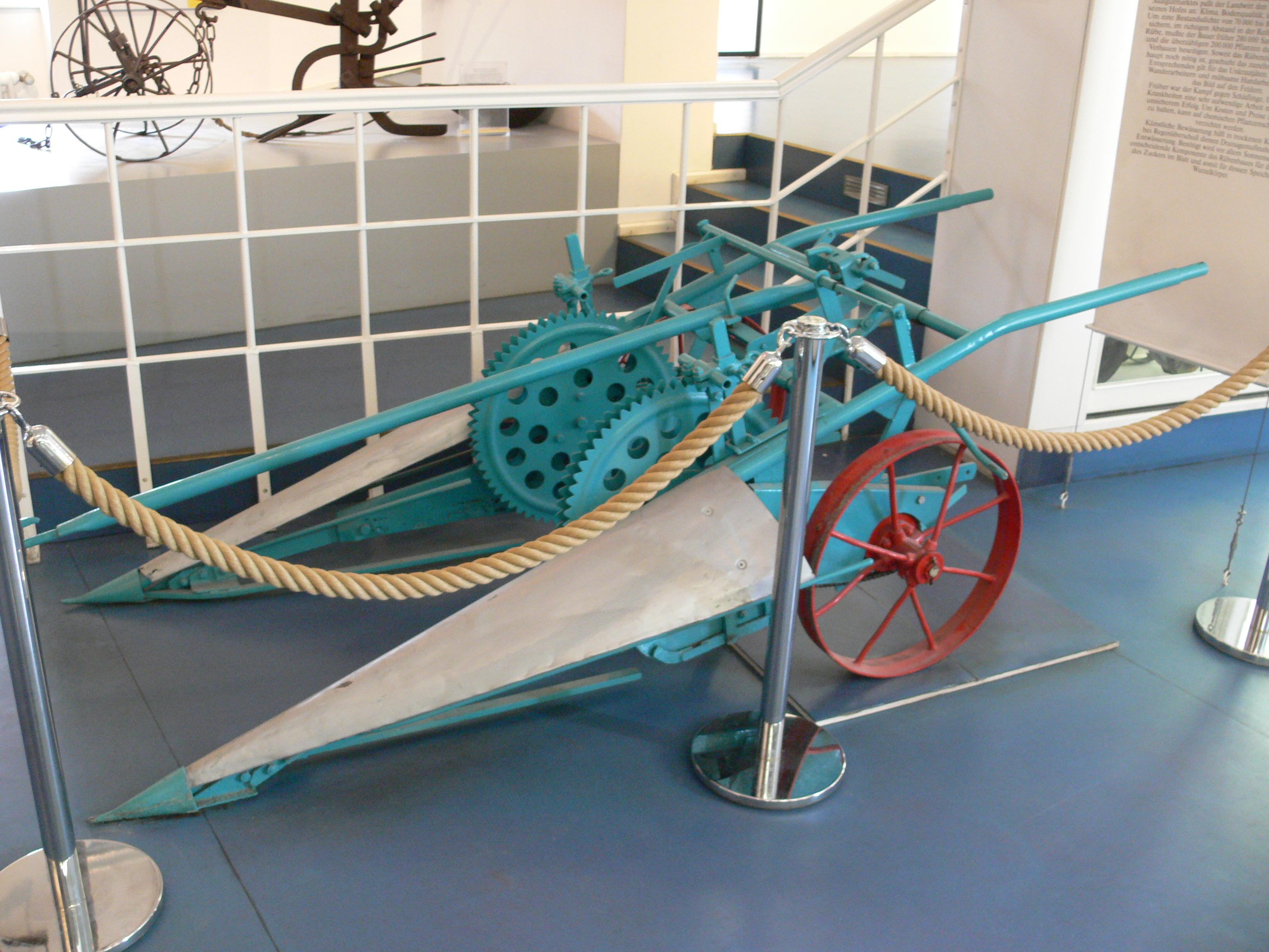 Zucker-Museum, Berlin: Rübenköpfschlitten für Zugtier